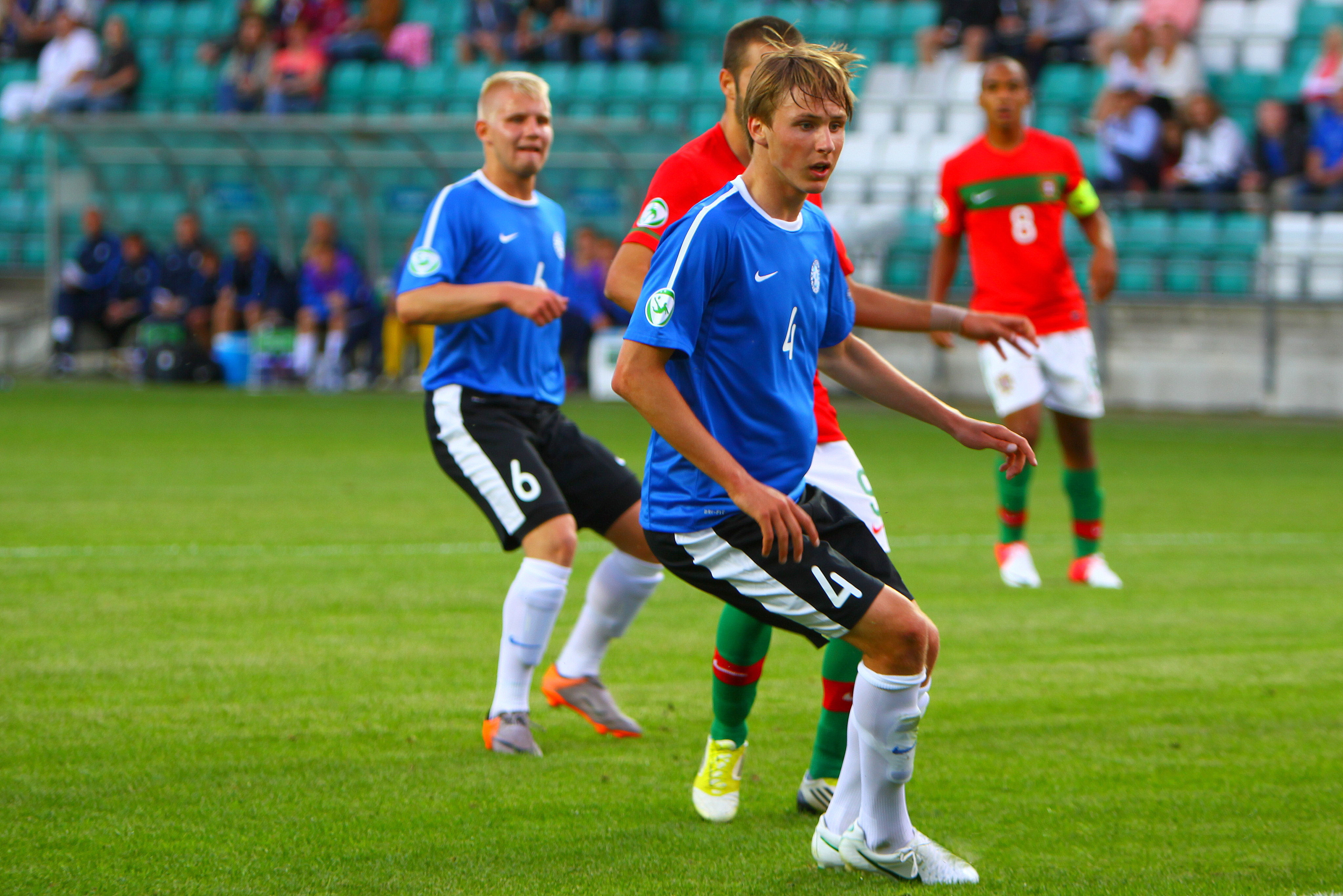 U-19 Estonia vs Portugal.